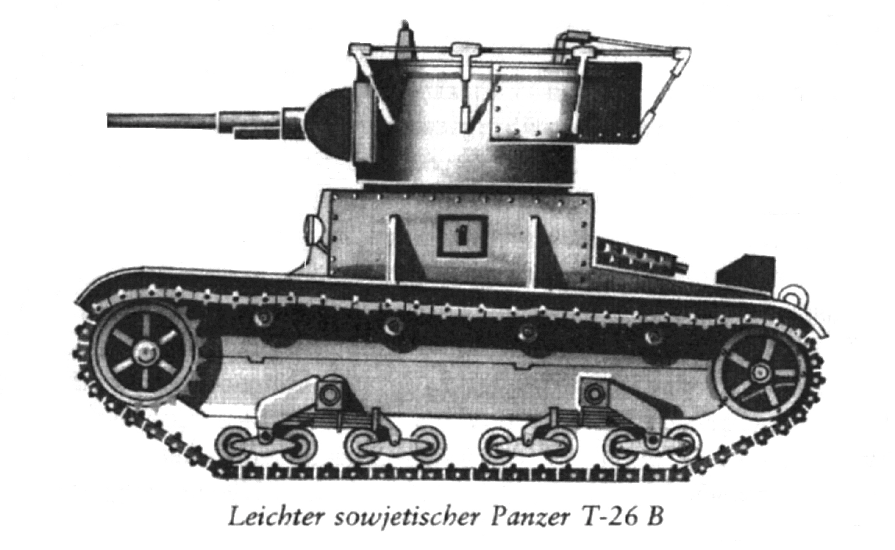 Bleistiftzeichnung nach einer Fotografie, angefertigt für eine Propaganda-Wandzeitung anlässlich des Tages der Sowjetarmee 1978 durch den Gefr.Treudler